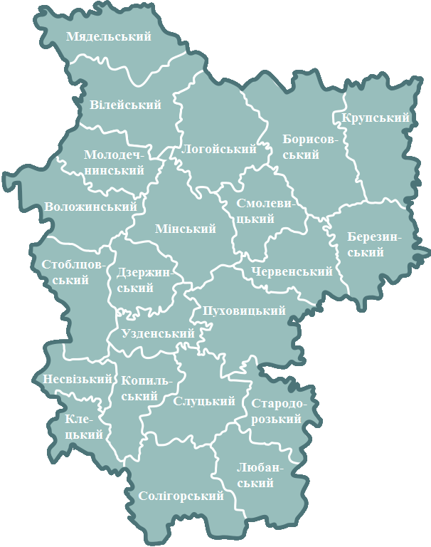 Назви районів Мінської області на мапі Беларуская (тарашкевіца): Назвы раёнаў Мінскай вобласці на карце (на ўкраінскай мове)